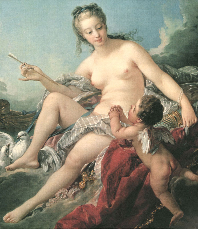 detail